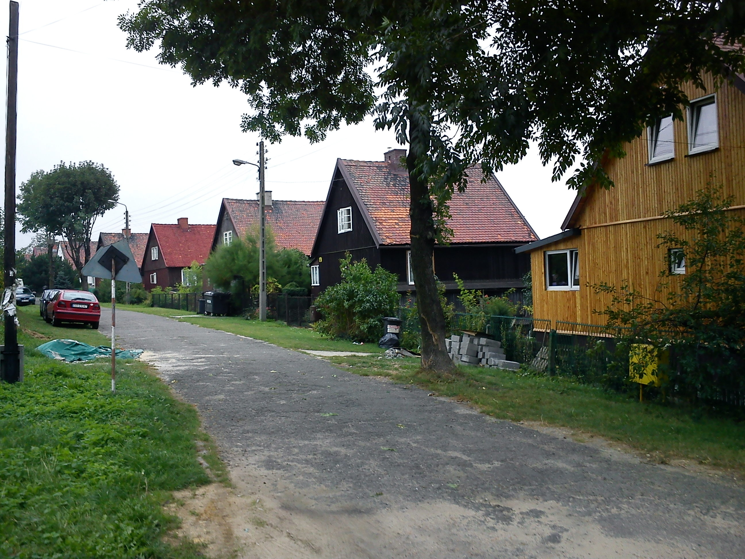 Sosnowiec-Klimontów.Domki Fińskie.